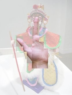 Taiwan-Puppet